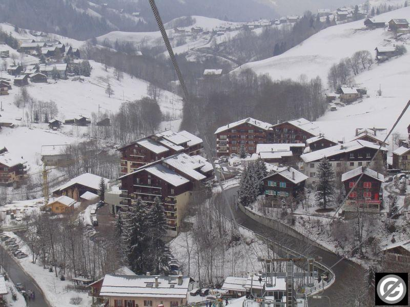 village d'areches beaufort. libre de droits.